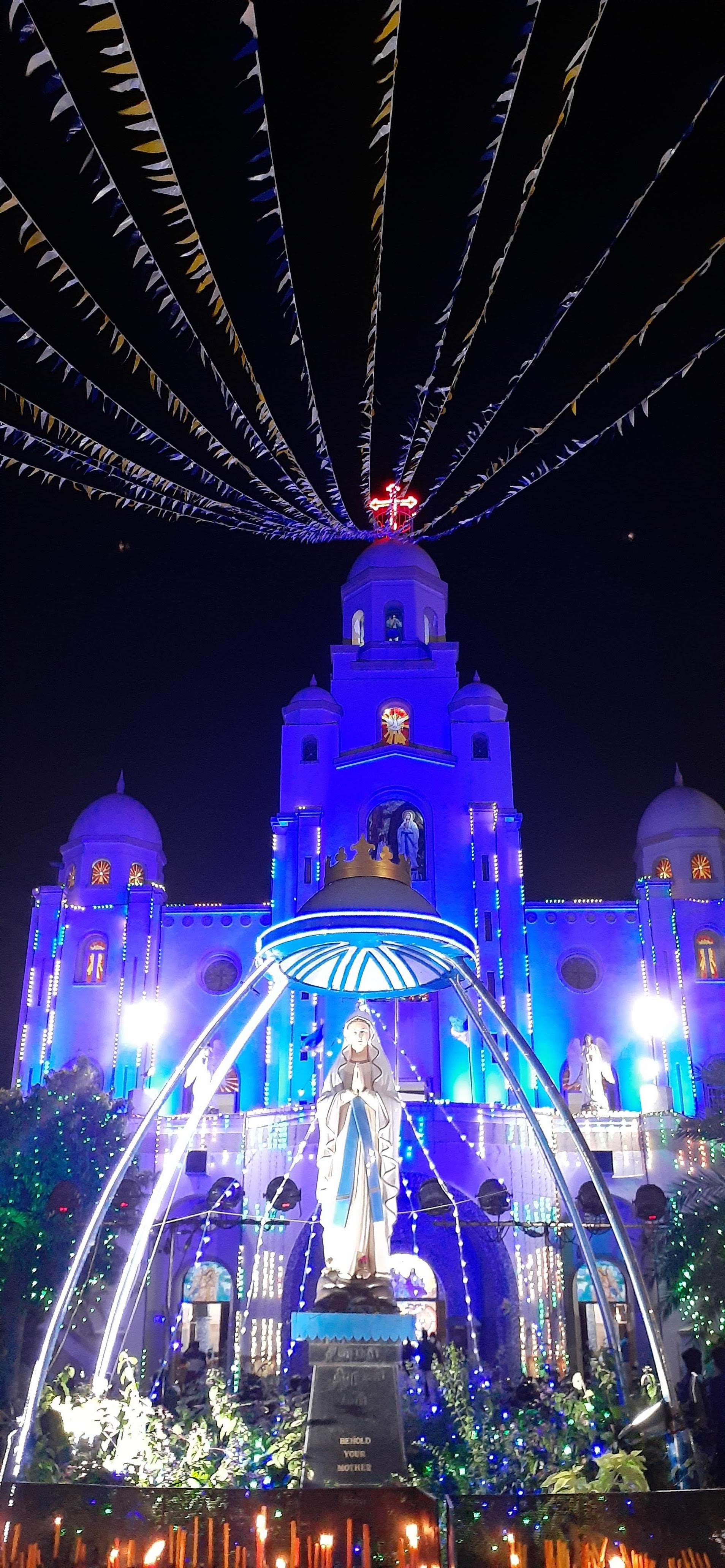 தூய லூர்து அன்னை திருத்தலம், பெரம்பூர், சென்னை, தமிழ்நாடு, இந்தியா.